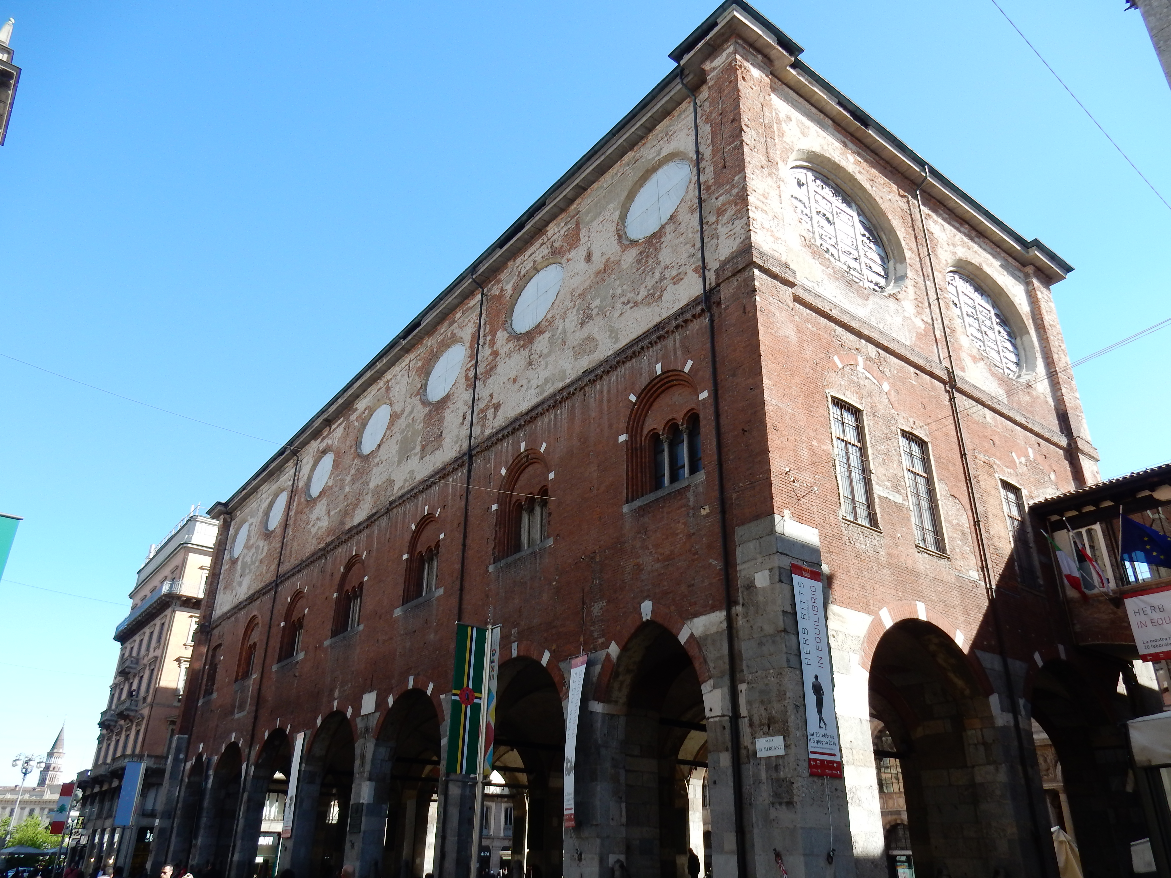 Palazzo della Ragione (Milano) This is a photo of a monument which is part of cultural heritage of Italy.